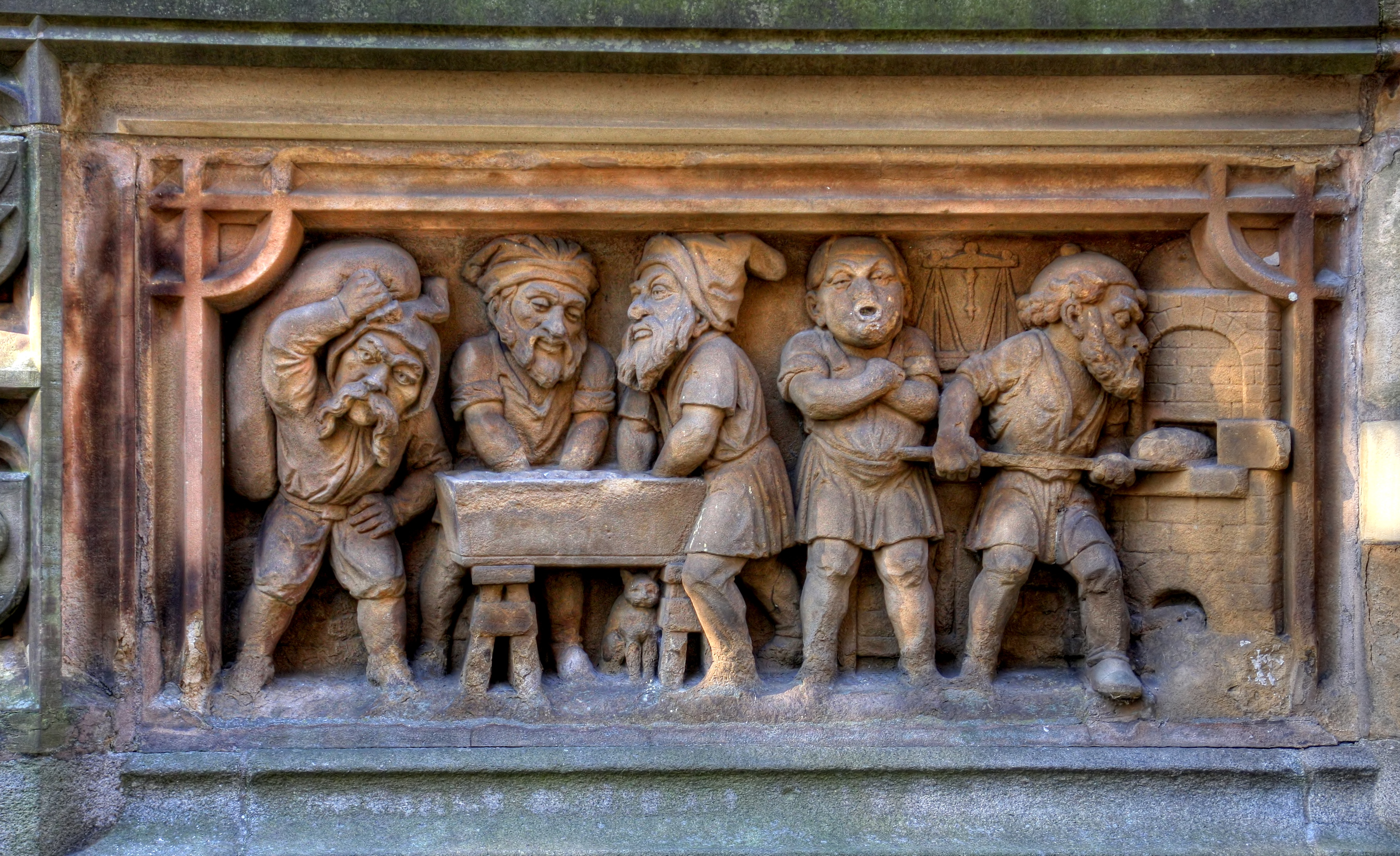 Heinzelmännchenbrunnen in Köln. Detail. Künstler: Edmund und Heinrich Renard. This is a photograph of an architectural monument.